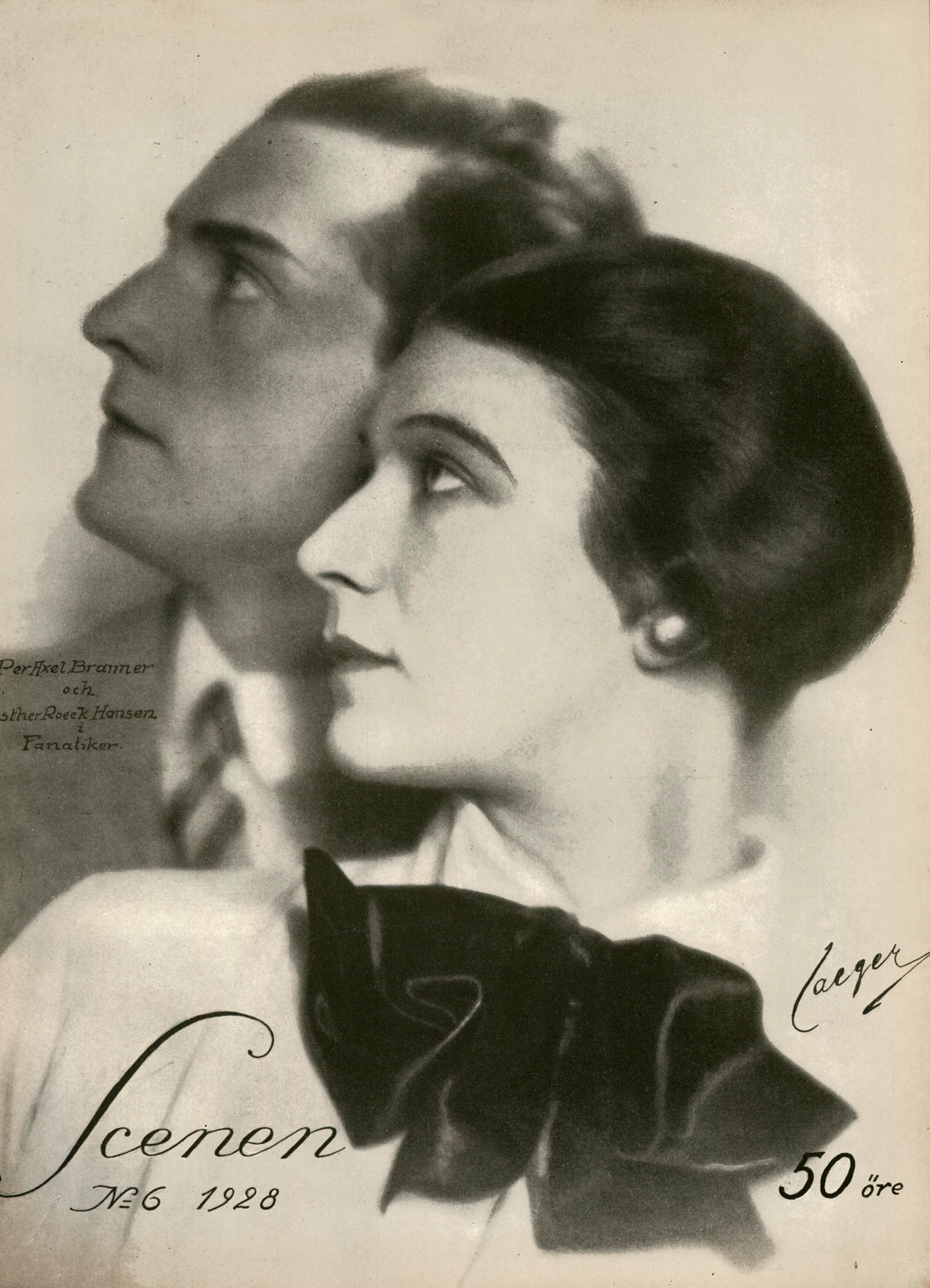 Per-Axel Branner (1899-1975) och Ester Roeck-Hansen (1897-1987) i Fanatiker. Foto på omslaget av Scenen 1928.